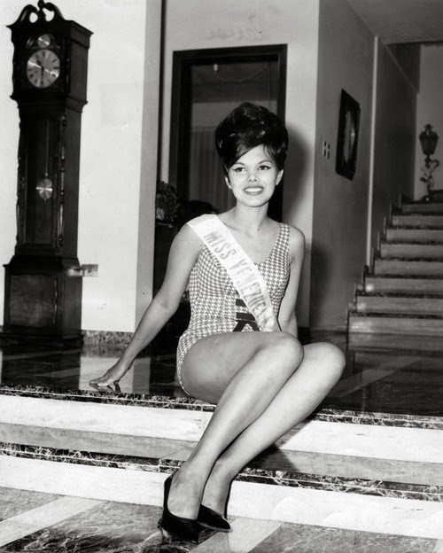 Miss Continente América 1964 fue el 1ª certamen de Miss Continente América, cuya final se realizó el martes 4 de agosto de 1964 en el Teatro Municipal José de la Cruz Mena en la ciudad de León, Nicaragua. 16 candidatas Participantes, de diferentes países compitieron en la primera versión de Miss Continente América. Cuya ganadora al final de la velada fue Sonia Mercedes Revenga de la Rosa de Venezuela.